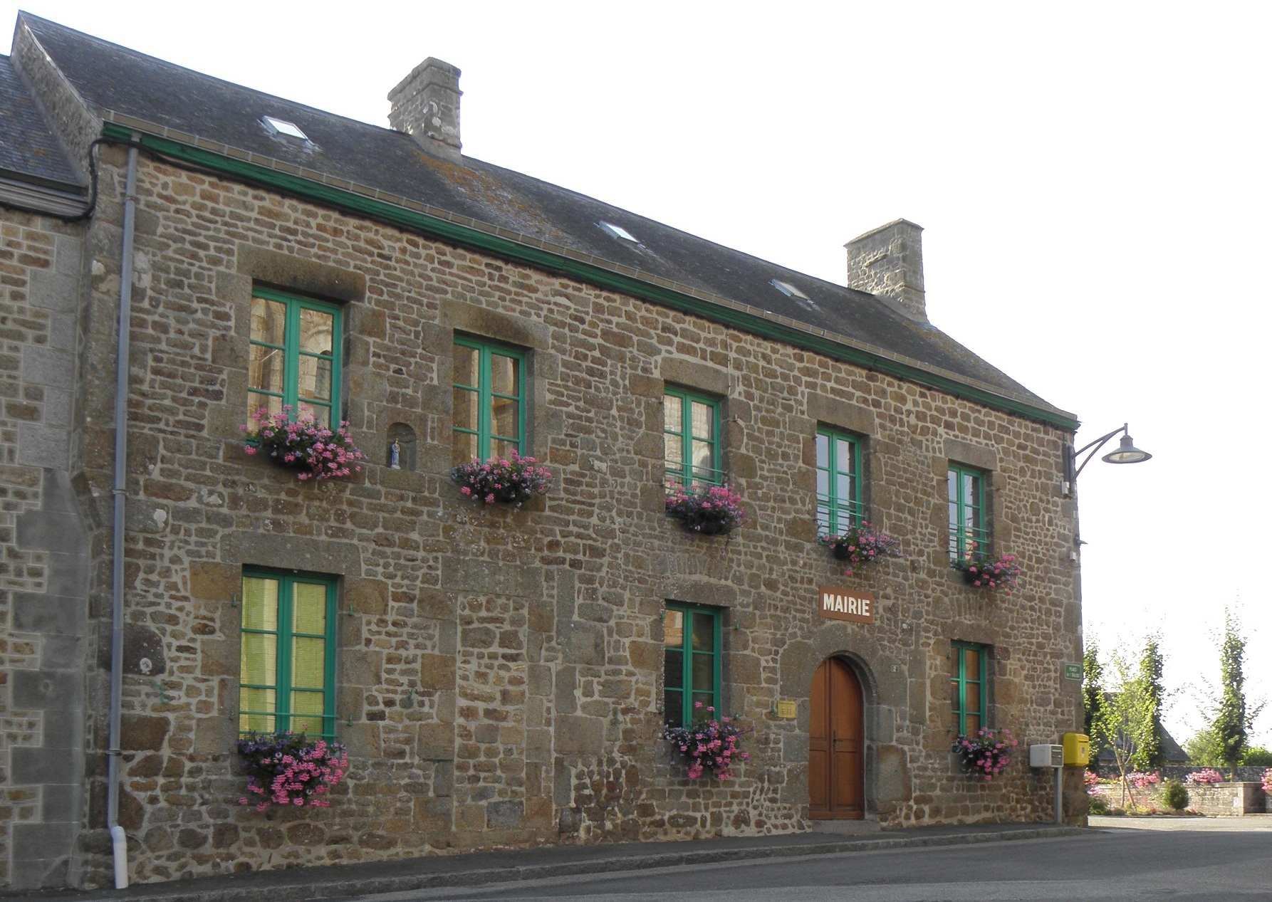 Mairie de Carelles (53).